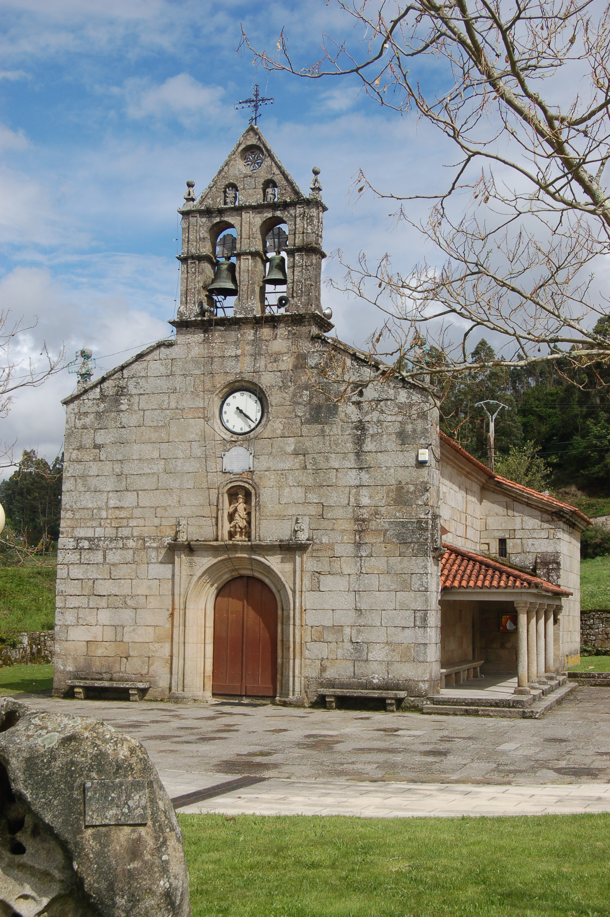 Igrexa parroquial de San Miguel de Marcón (Pontevedra)